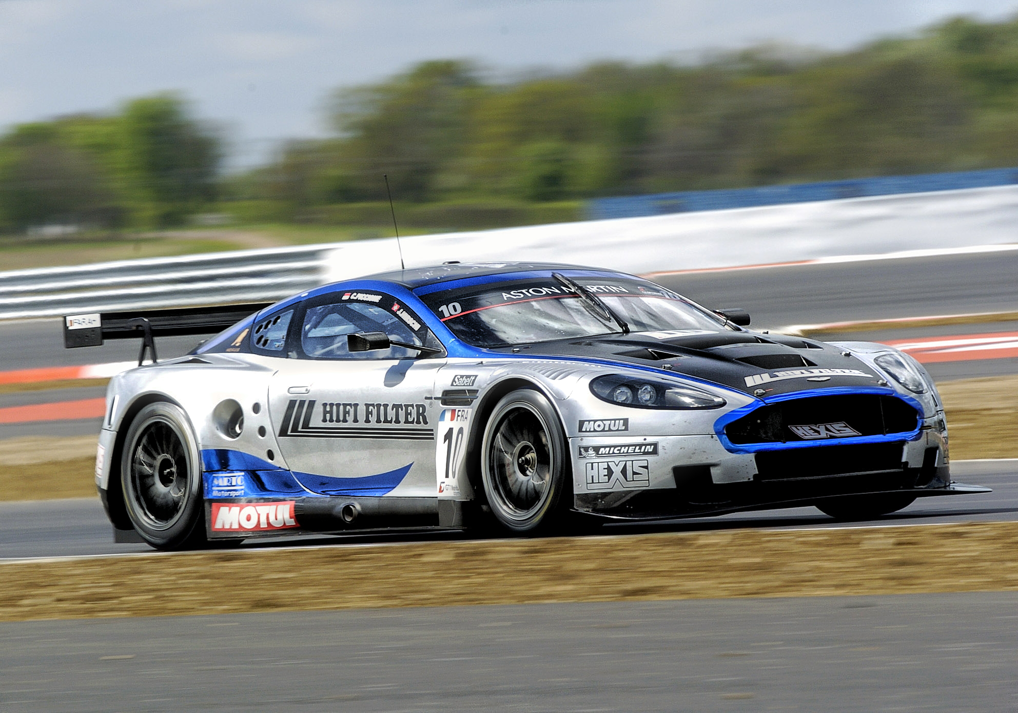 Aston martin DB9 GT1world 2010 Silverstone Jonathan Hirschi